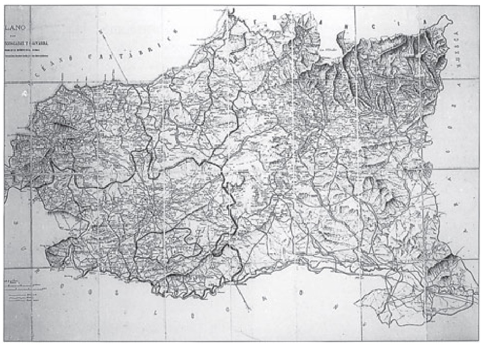 “Plano de las provincias vascongadas y Navarra”. Espainiako Depósito de la Guerra delakoan marraztua eta autografiatua (1876).